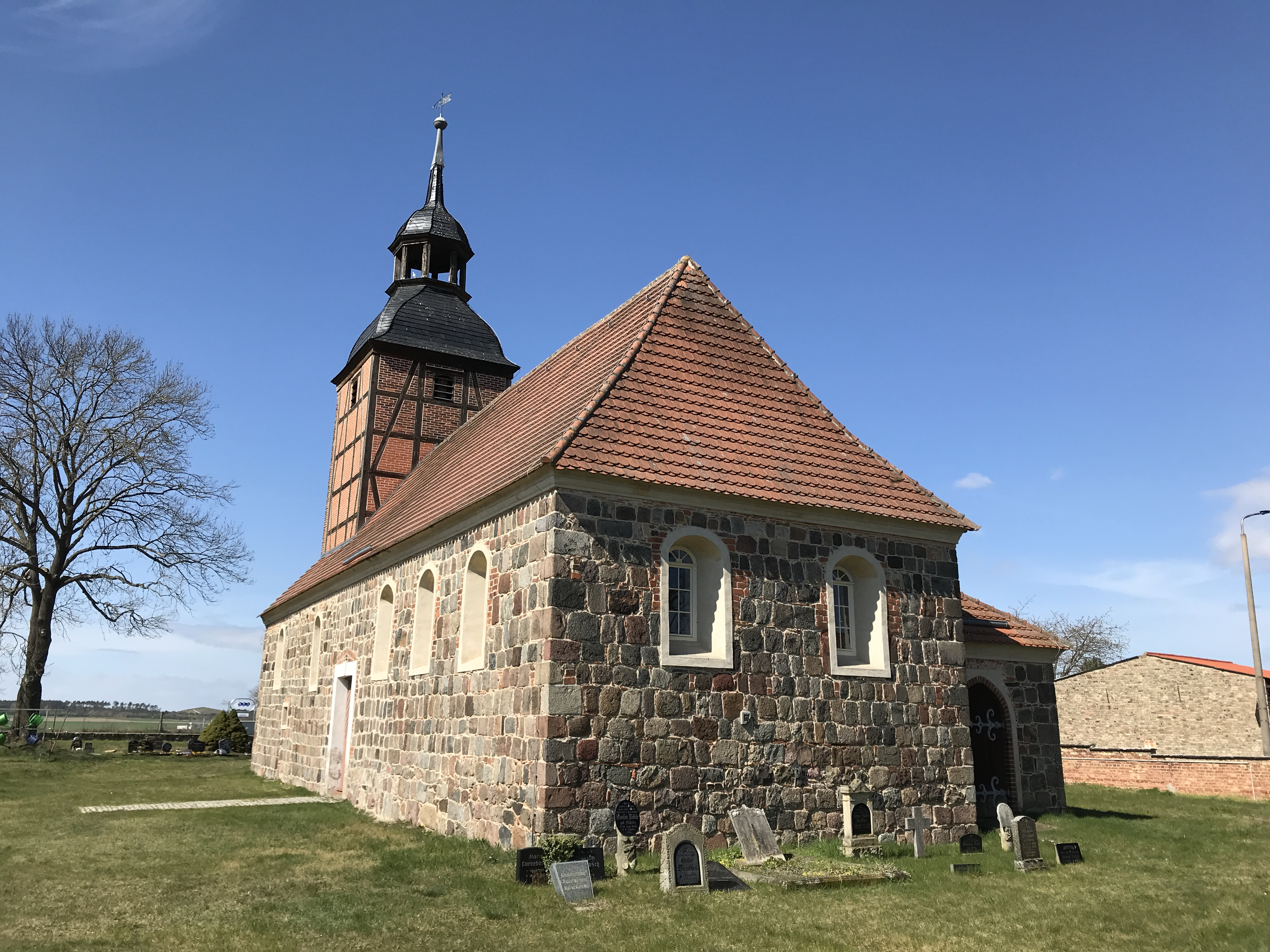 Dorfkirche Markendorf, Jüterbog im Landkreis Teltow-Fläming in Brandenburg